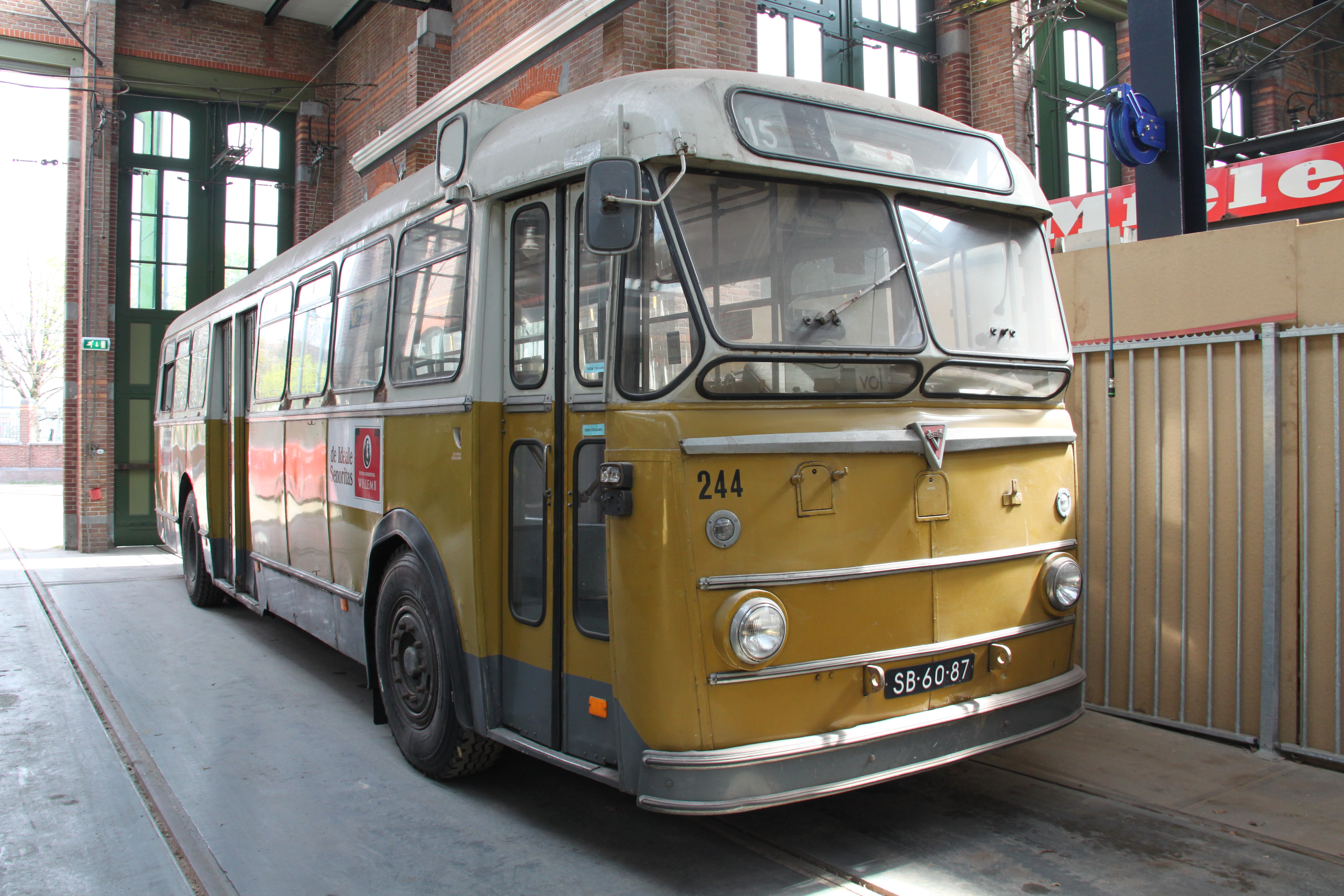 Museumbus van de ENHABO, onderdeel van het Haags Bus Museum.